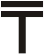 The Kazakhstani tenge symbol